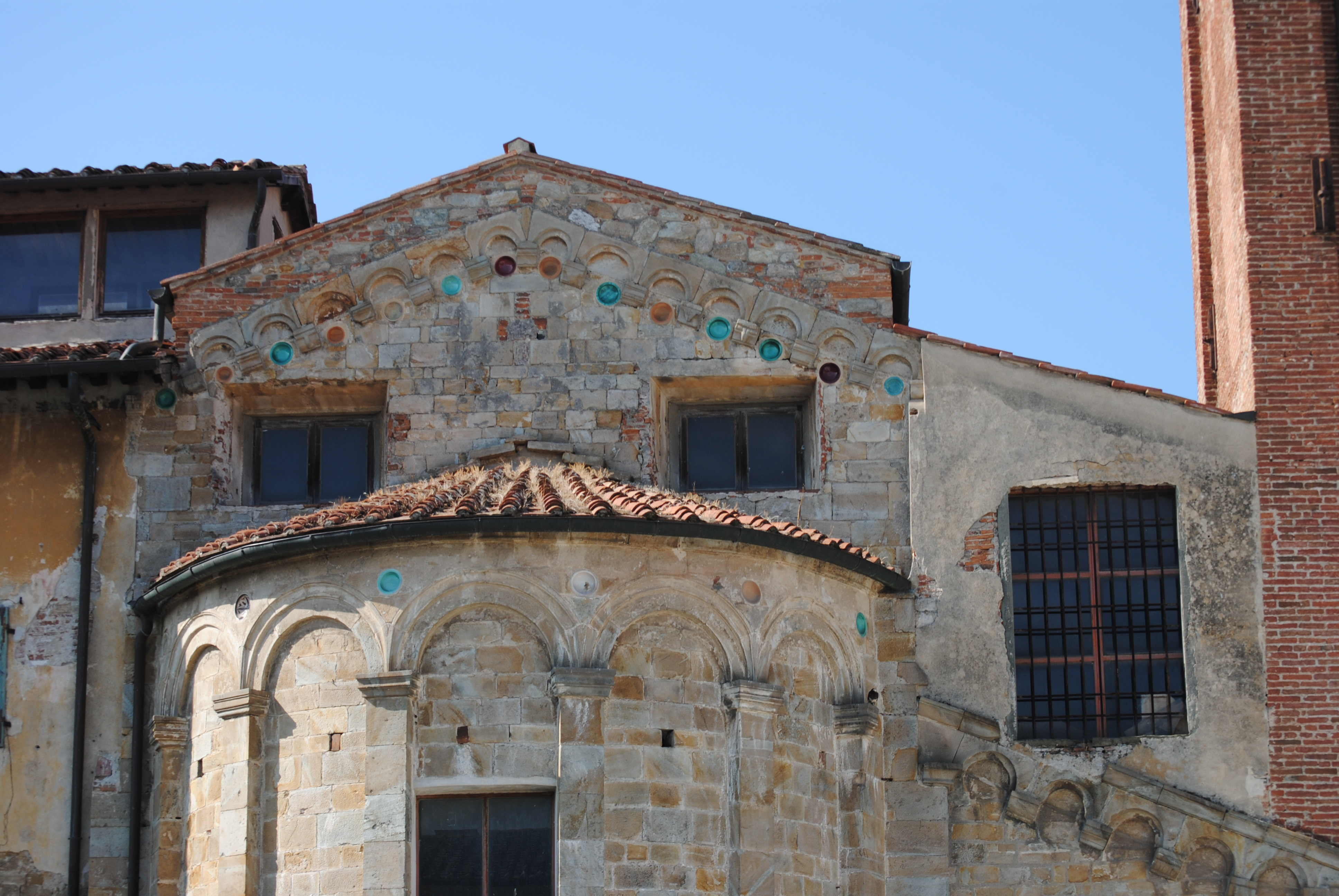 Retro della chiesa di San Silvestro a Pisa